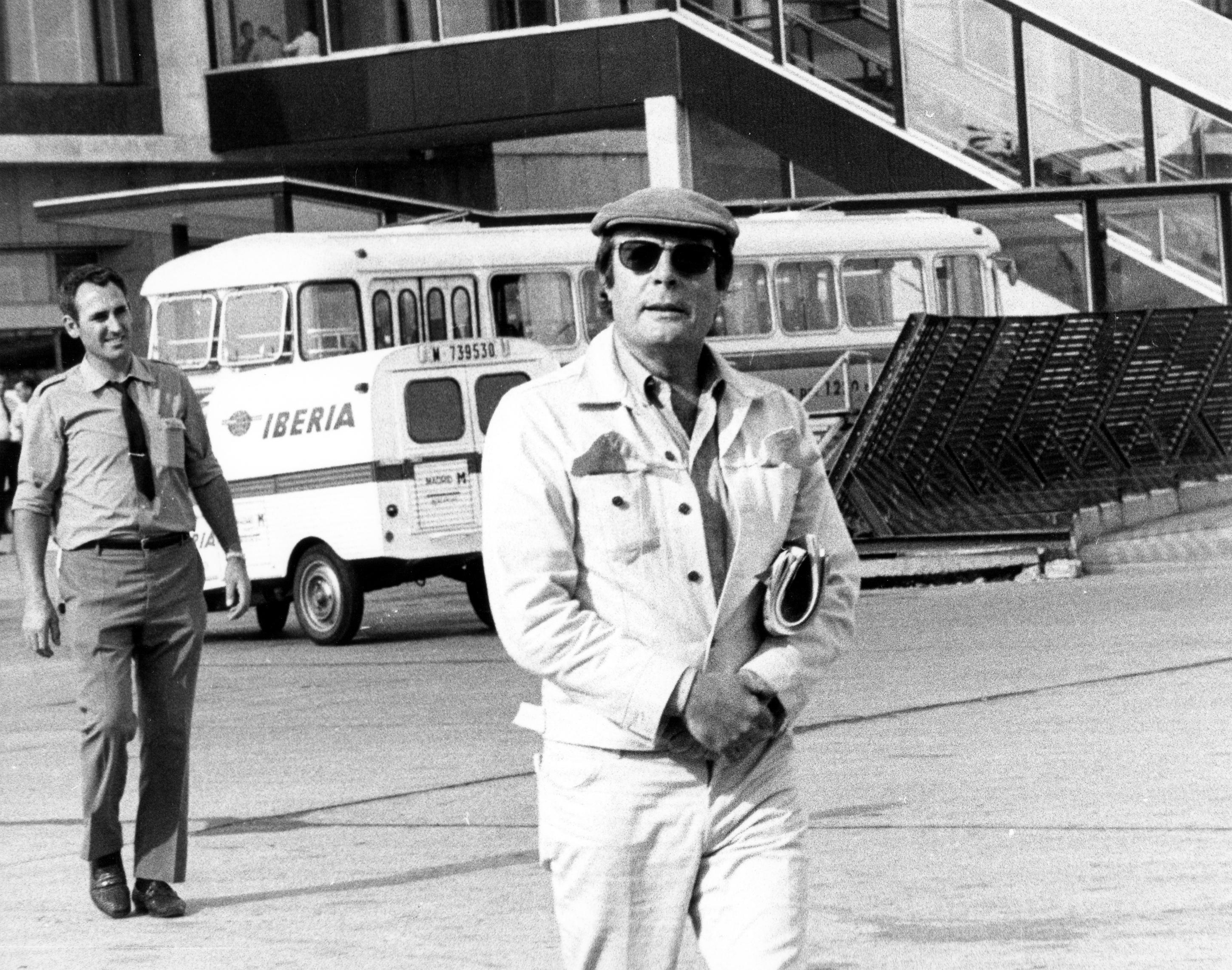 El actor italiano a su llegada al aeropuerto de Madrid-Barajas.